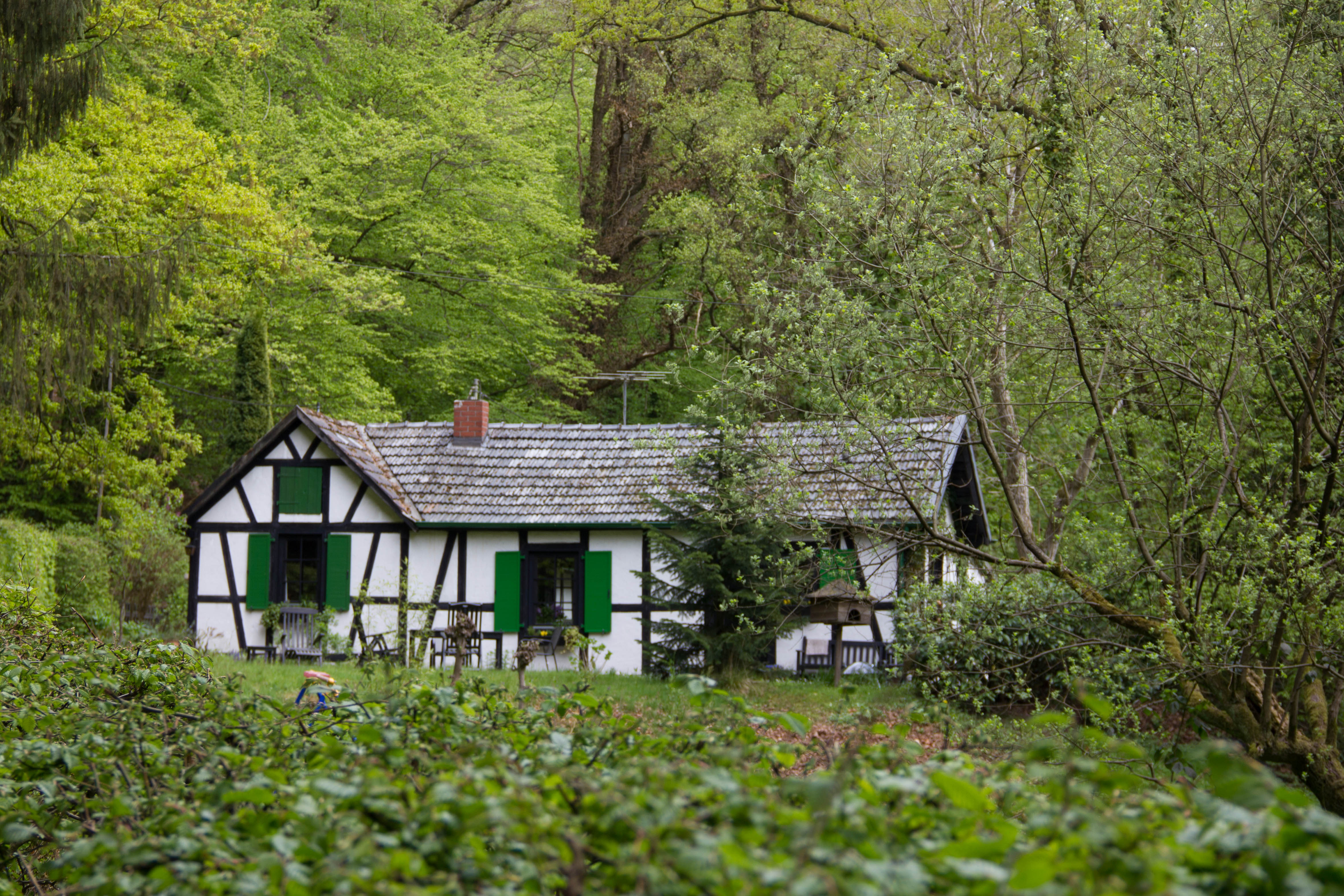 Fachwerkhaus an der Grube Pilot